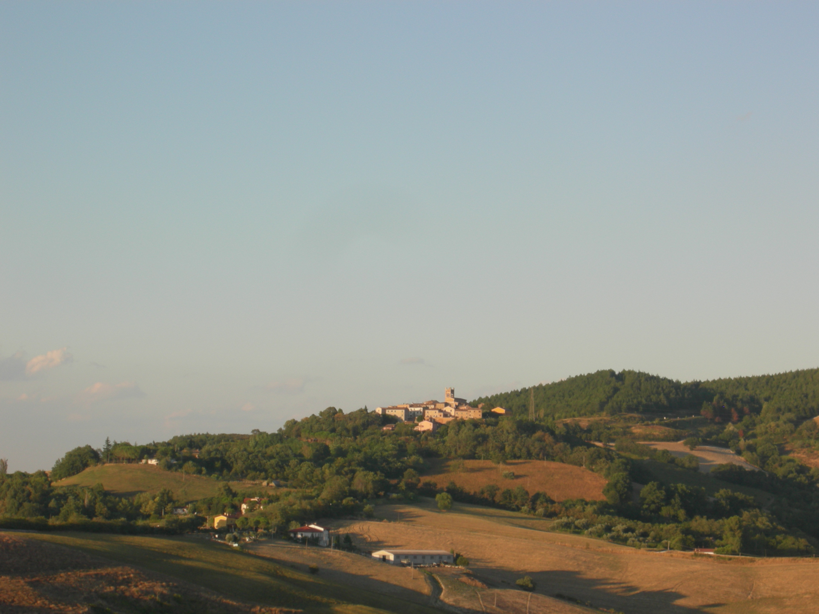 Panorama di Montefabbri, nel comune di Colbordolo (PU), Italia.